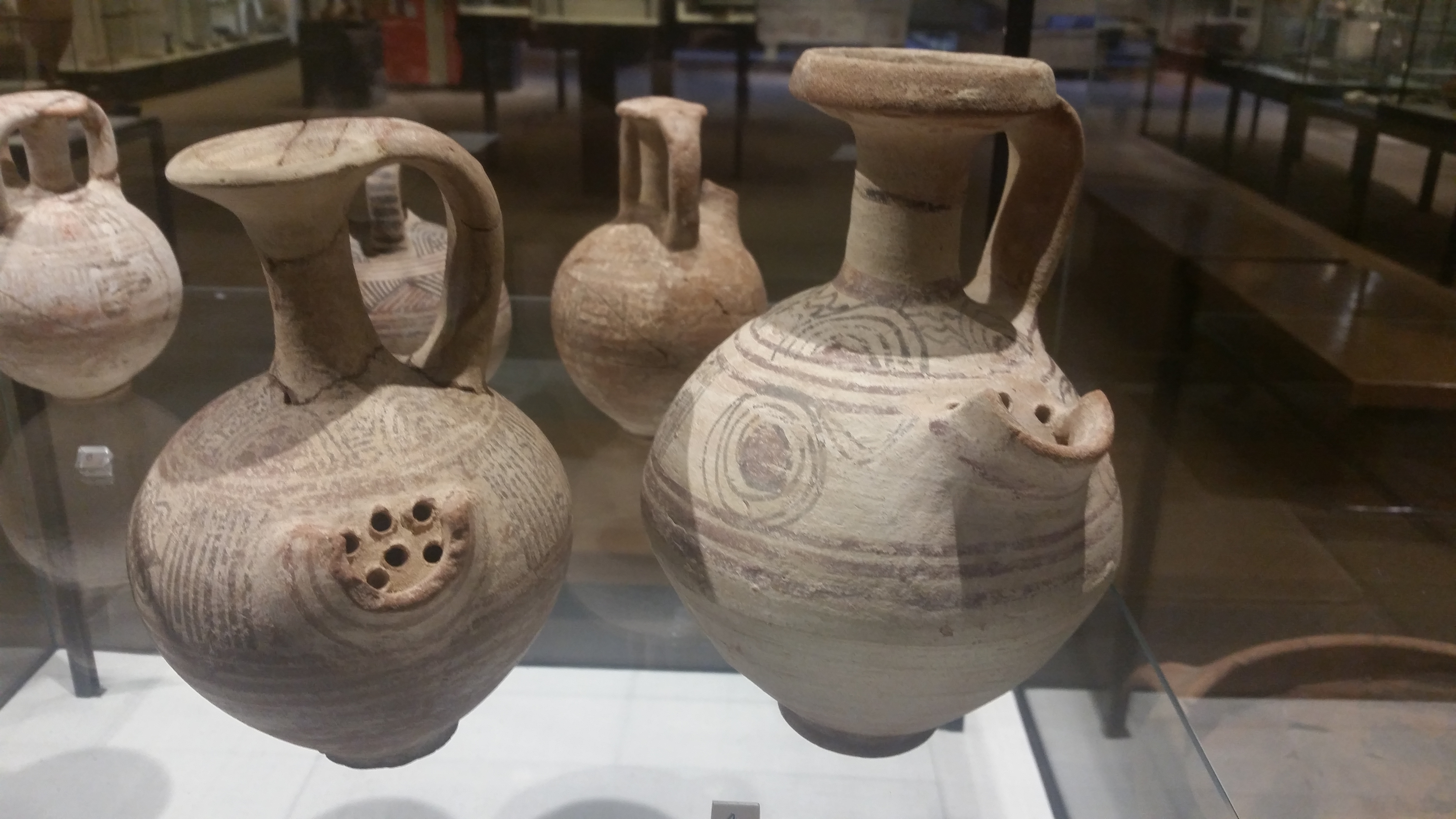 פכים בעלי חדק ומסננת כלי חרס פלישתיים. הפכים נקראים פכי בירה. העיטור דו גוני על חיפוי לבן. יש חלוקה למטופות עם דגמים גאומטריים. הפכים נמצאו באזור, אוסף מוזיאון הכט